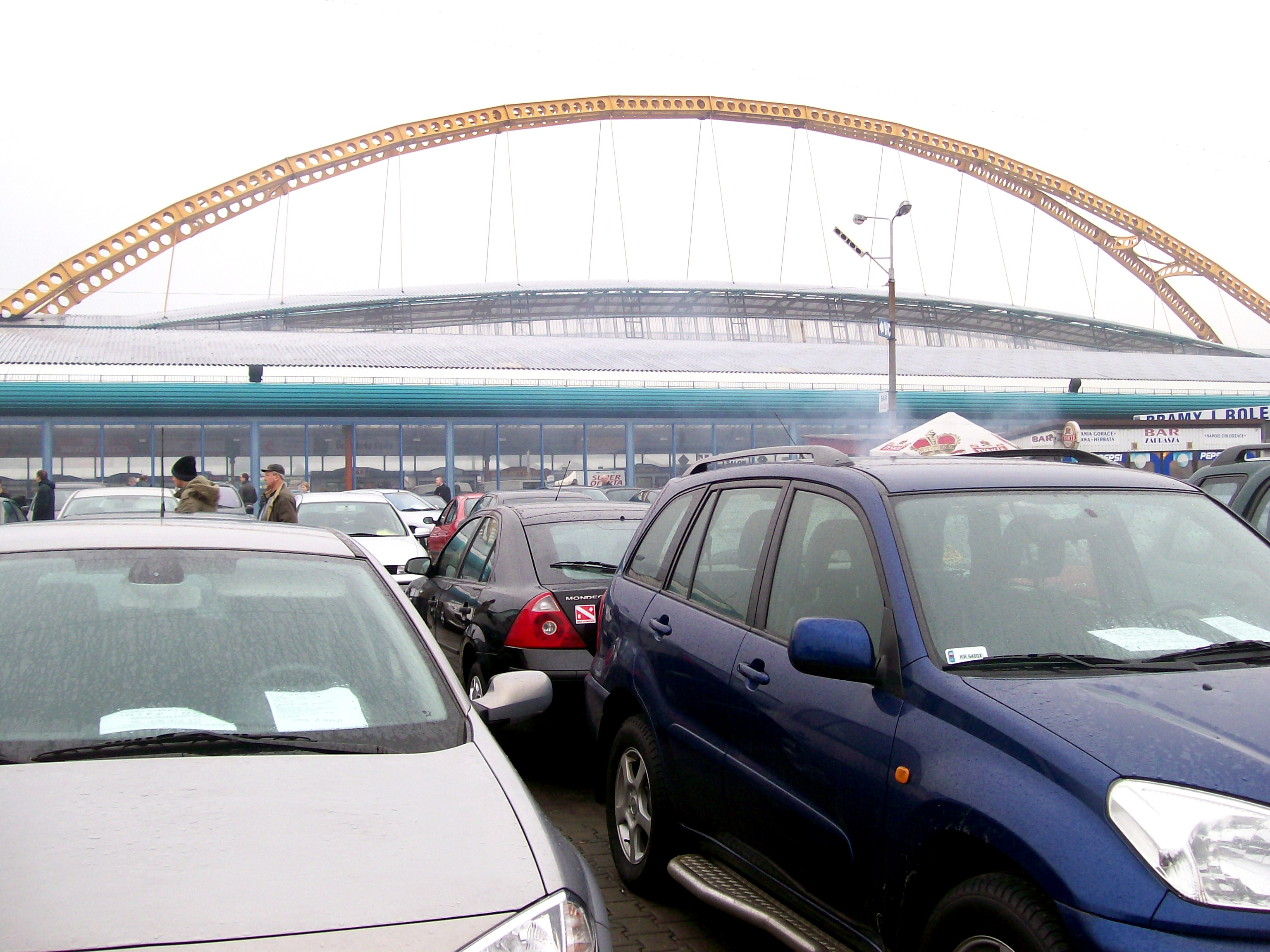 Giełda samochodowa w Mysłowicach.